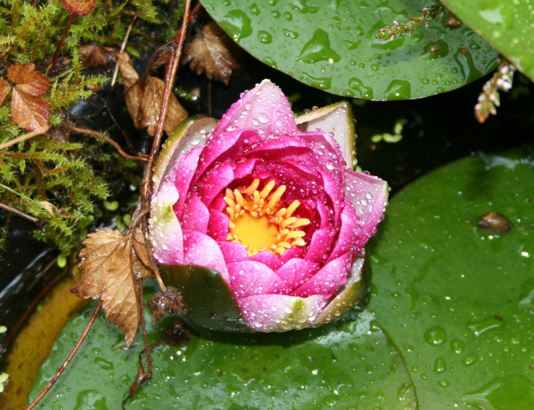 Nymphaea 'Pygmaea Rubra'/ kleine rosa Seerose mit Regentropfen